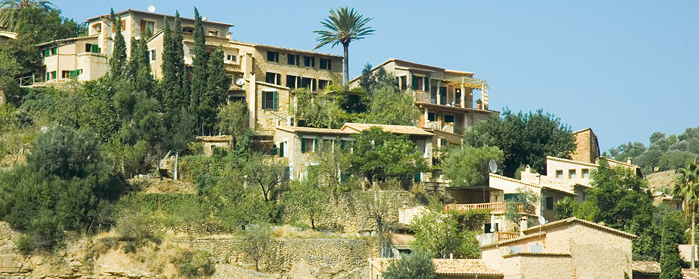 Deia